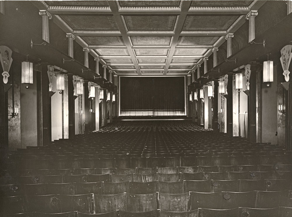 Colosseum interior 1930s